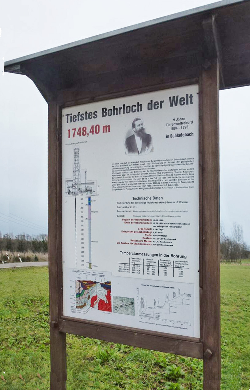 Infotafel zur Bohrung in Schladebach (Leuna), die den Weltrekord in den Jahren 1884-1893 hielt. Inzwischen wurden Bohrungen von 3000 – 6000 m ausgeführt (Hot-Dry-Rock-Verfahren).